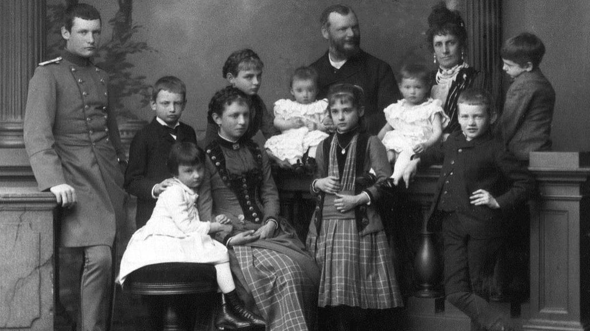 Photo - Der spätere König Ludwig III. von Bayern mit Frau und 10 seiner Kinder